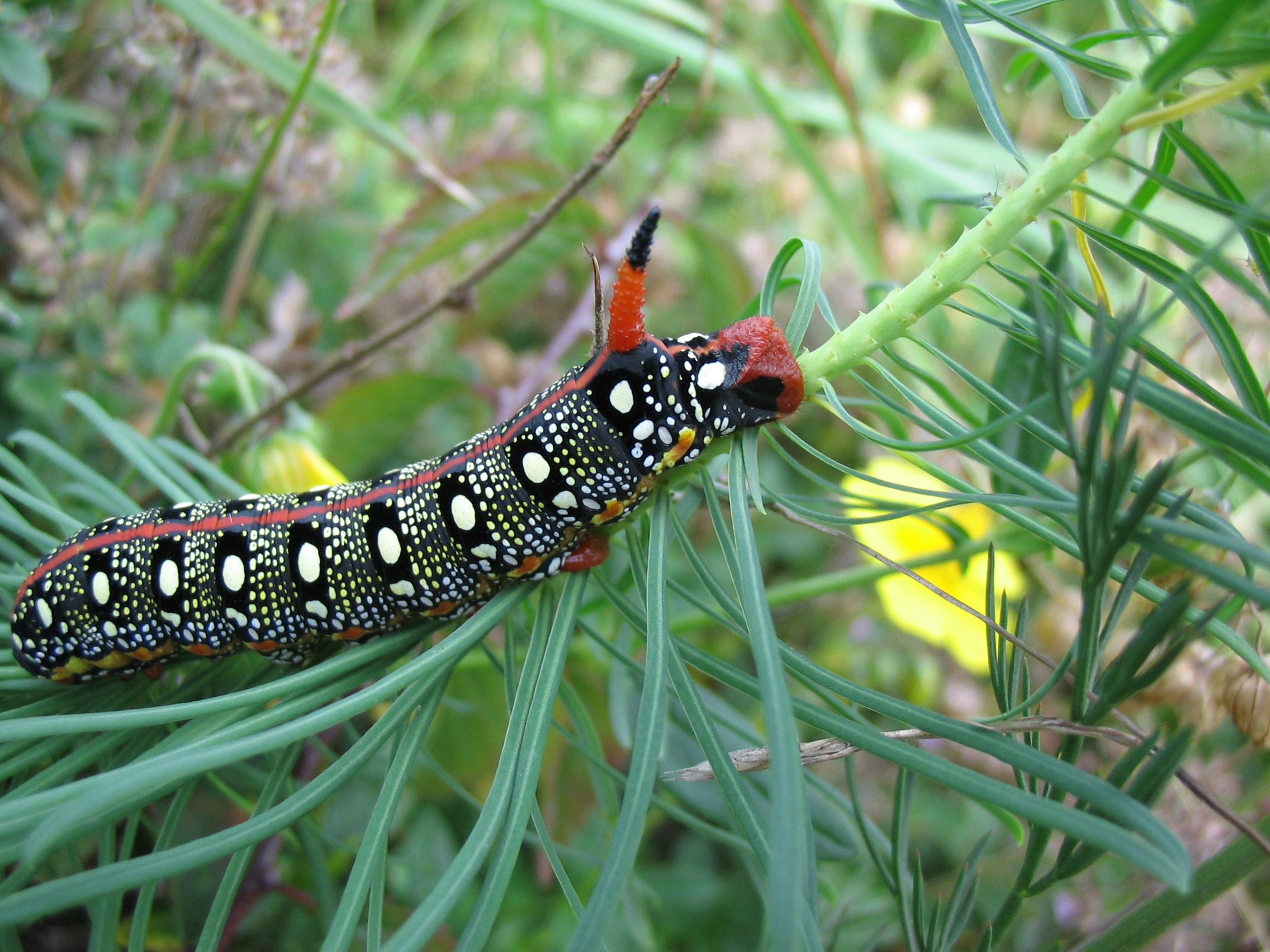 Hyles euphorbiae photo by Office de tourisme des monts de Gy France